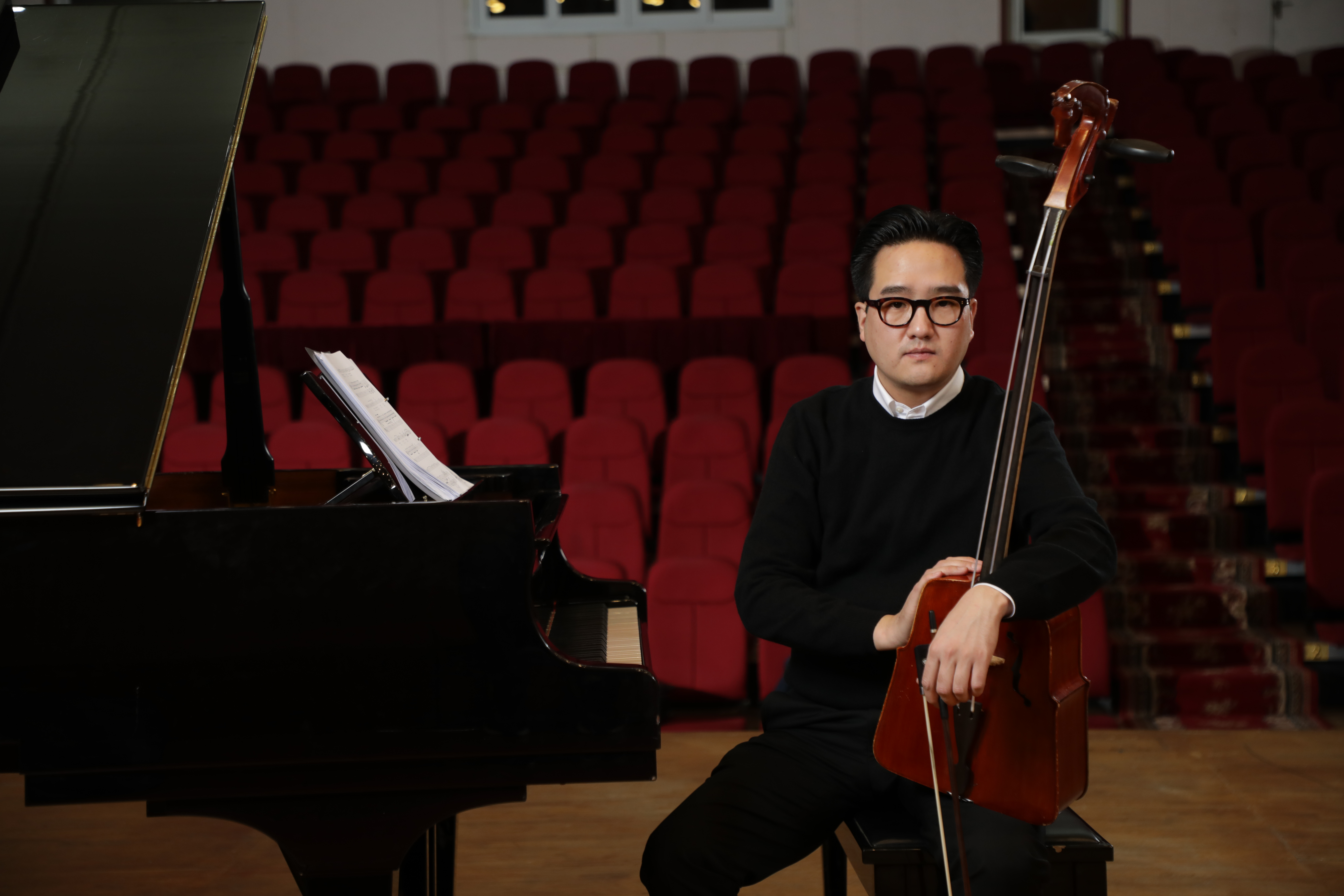 Монгол: 2020